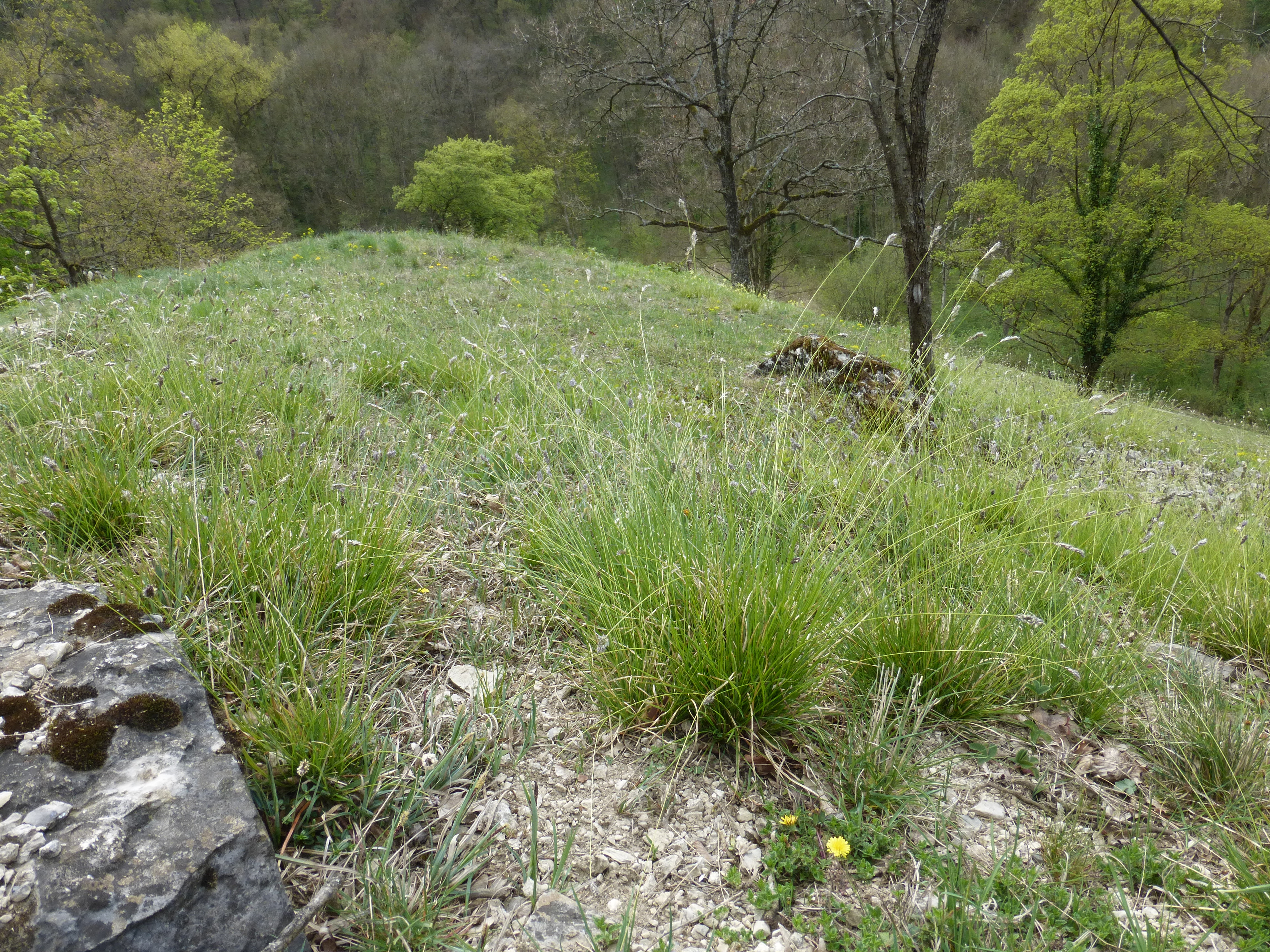 Geröteter Löwenzahn (Taraxacum rubicundum) Hammelrain Markgröningen 14. April 2017